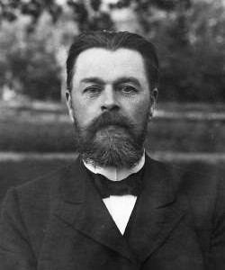 Депутат Первой Государственной думы от Тверской губернии Владимир Дмитриевич Кузьмин-Караваев